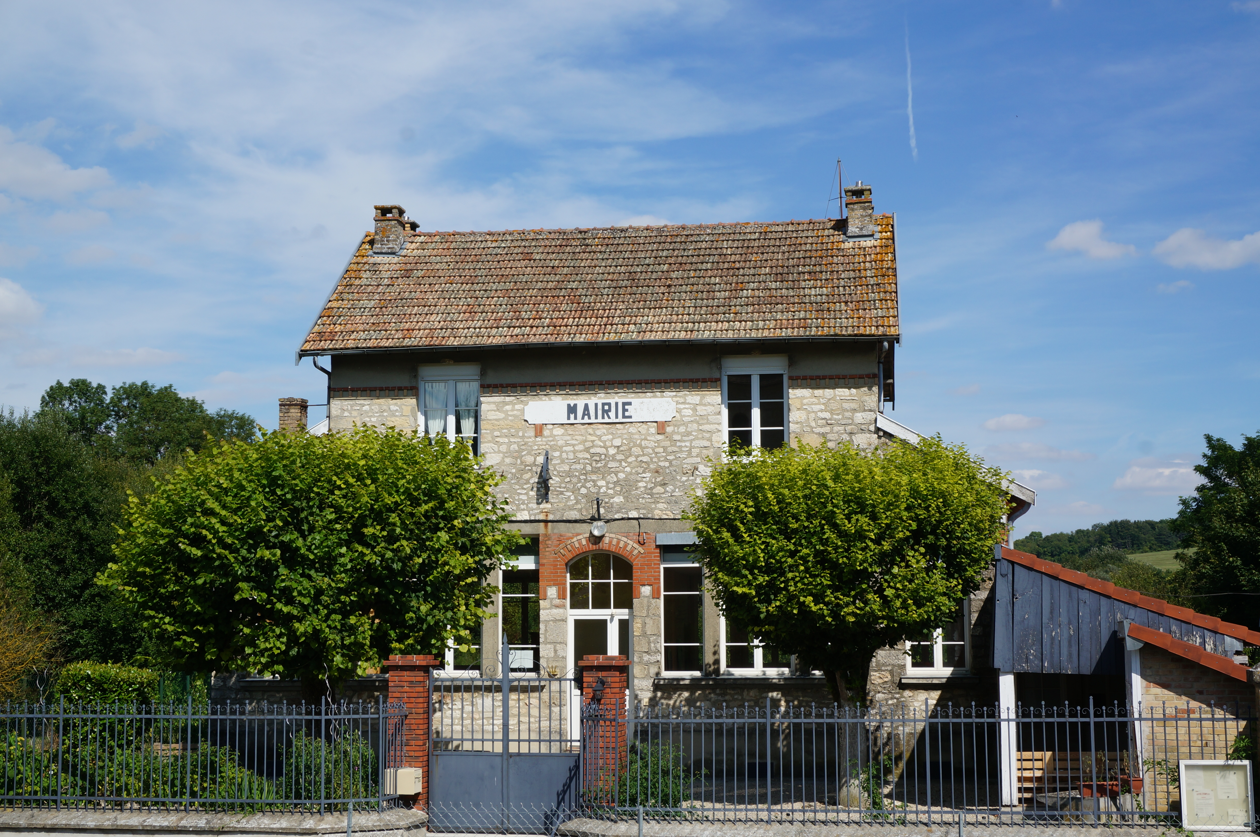 Chambrecy .